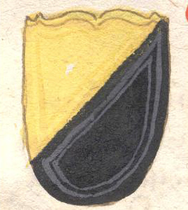 Wappen Salzburger Erzbischöfe aus der Salzburgischen Chronik bis 1587 (für frühe Bischöfe sicherlich apokryph), Universitätsbibliothek Salzburg; Konrad I. von Abensberg